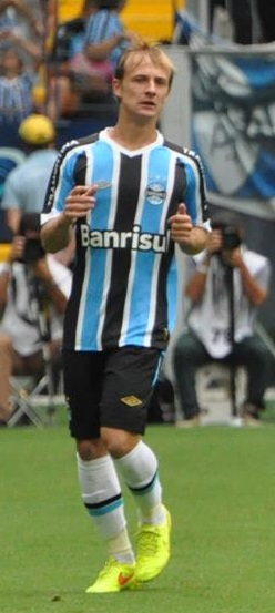 Marcelo Hermes atuando pelo Grêmio em partida contra a União Frederiquense pelo Campeonato Gaúcho de 2015.